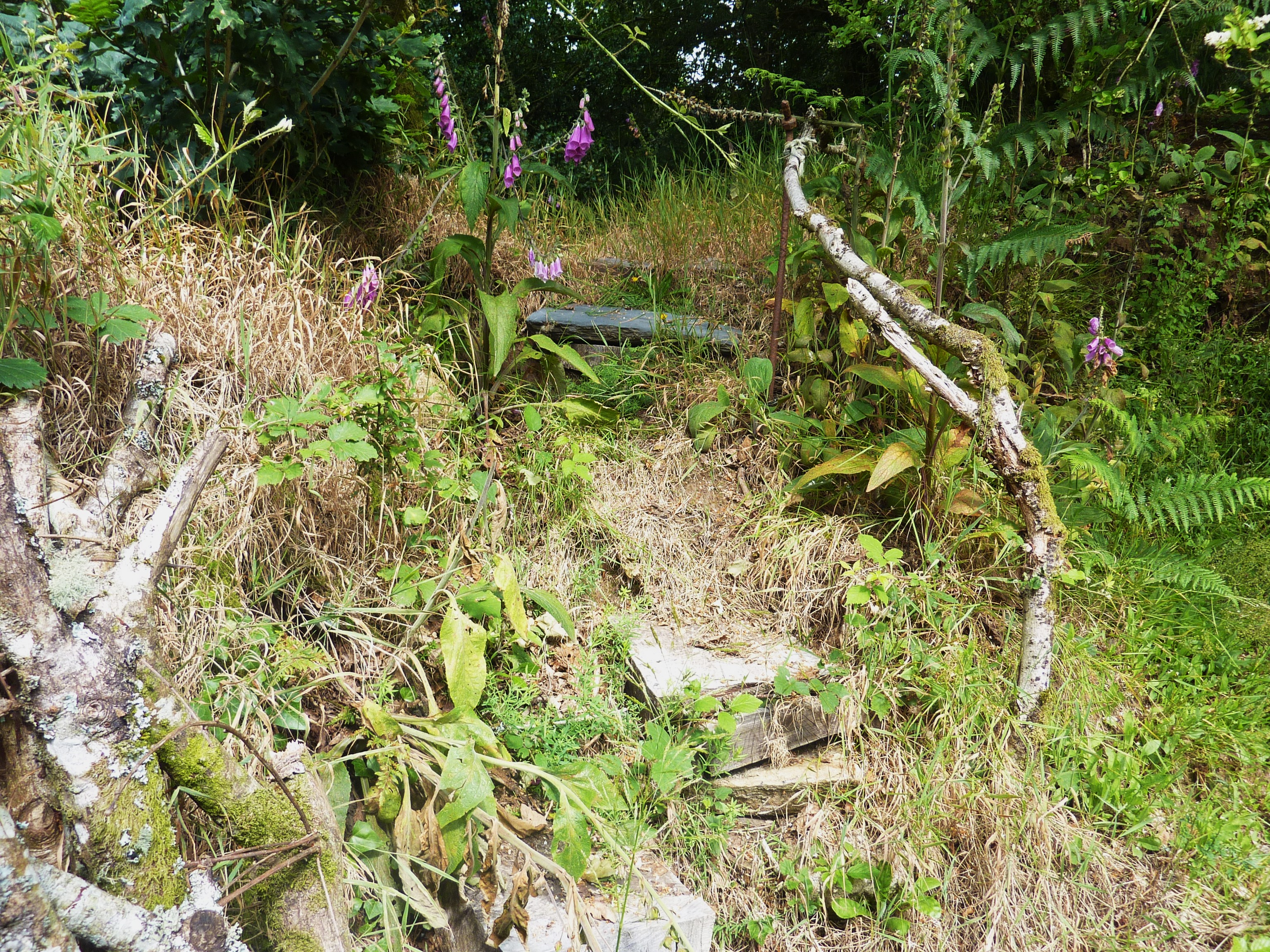 Echalier permettant de franchir une haie